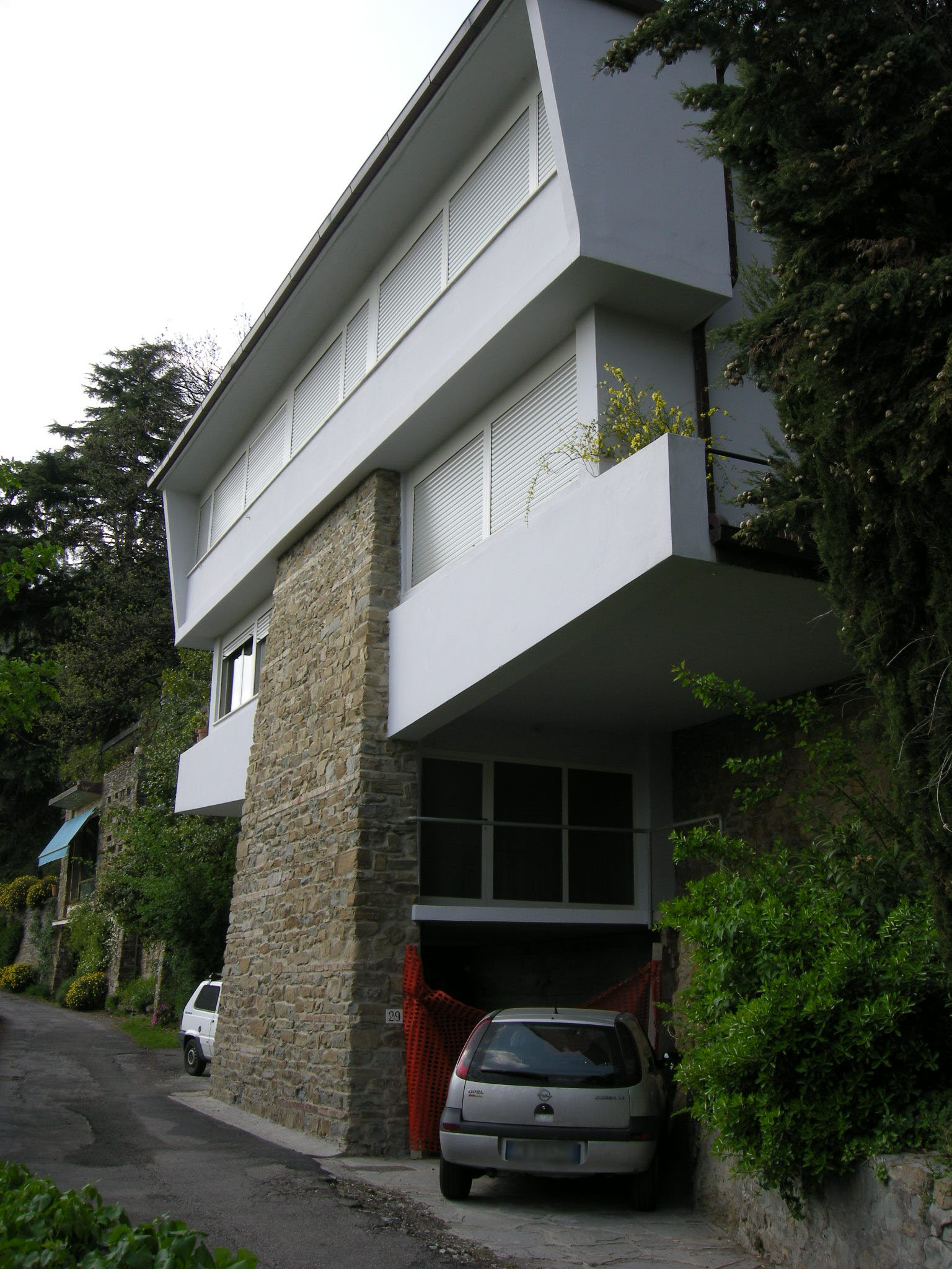 Complesso di monterinaldi